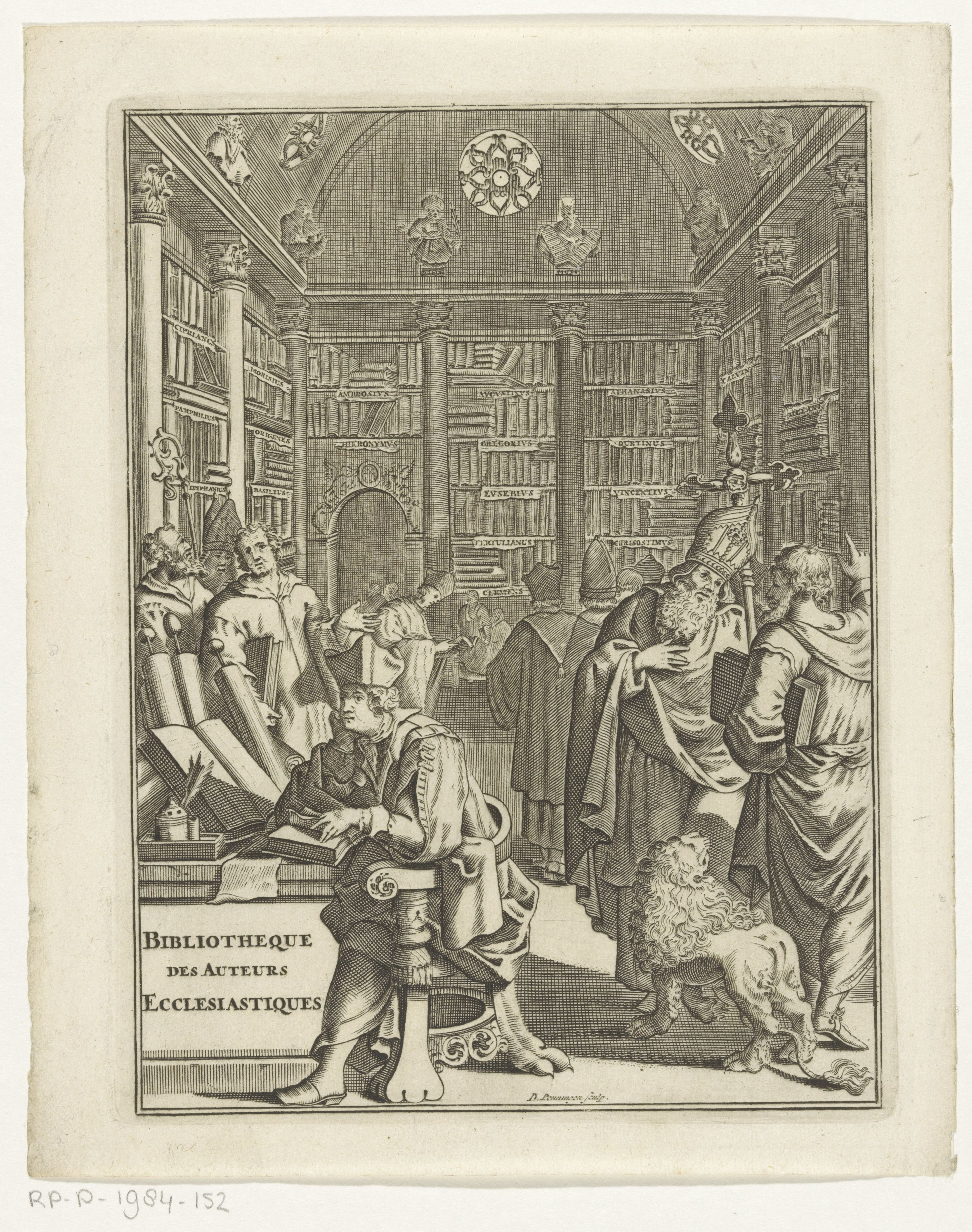 IdentificatieTitel(s): Geestelijken in bibliotheekTitelpagina voor: Louis Ellies Dupin, Nouvelle Bibliotheque des Auteurs Ecclesiastiques, 1691Objecttype: prent titelpagina Objectnummer: RP-P-1984-152Catalogusreferentie: Hollstein Dutch 1Opschriften / Merken: verzamelaarsmerk, verso, gestempeld: Lugt 2228verzamelaarsmerk, verso, gestempeld: Lugt 2760Omschrijving: Bibliotheekinterieur Waar: in geestelijken met diverse functies lezen en discussiëren. Op de planken boeken van kerkvaders en andere geestelijken.VervaardigingVervaardiger: prentmaker: Daniël met de Penningen (vermeld op object)uitgever: Huguetan (mogelijk)Plaats vervaardiging: AmsterdamDatering: 1691Materiaal: papier Techniek: etsen / graveren (drukprocedé)Afmetingen: plaatrand: h 220 mm × b 166 mmToelichtingTitelpagina voor: Dupin, Louis Ellies. Nouvelle Bibliotheque des Auteurs Ecclesiastiques. Amsterdam: Huguetan, 1691.OnderwerpWat: archiveorganization, functionaries and dignitaries in churches and in related institutionsVerwerving en rechtenCredit line: Aankoop uit het F.G. Waller-FondsVerwerving: aankoop 1984Copyright: Publiek domein